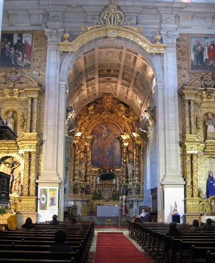 Monastery of Grijó - Mosteiro de Grijó - Altar